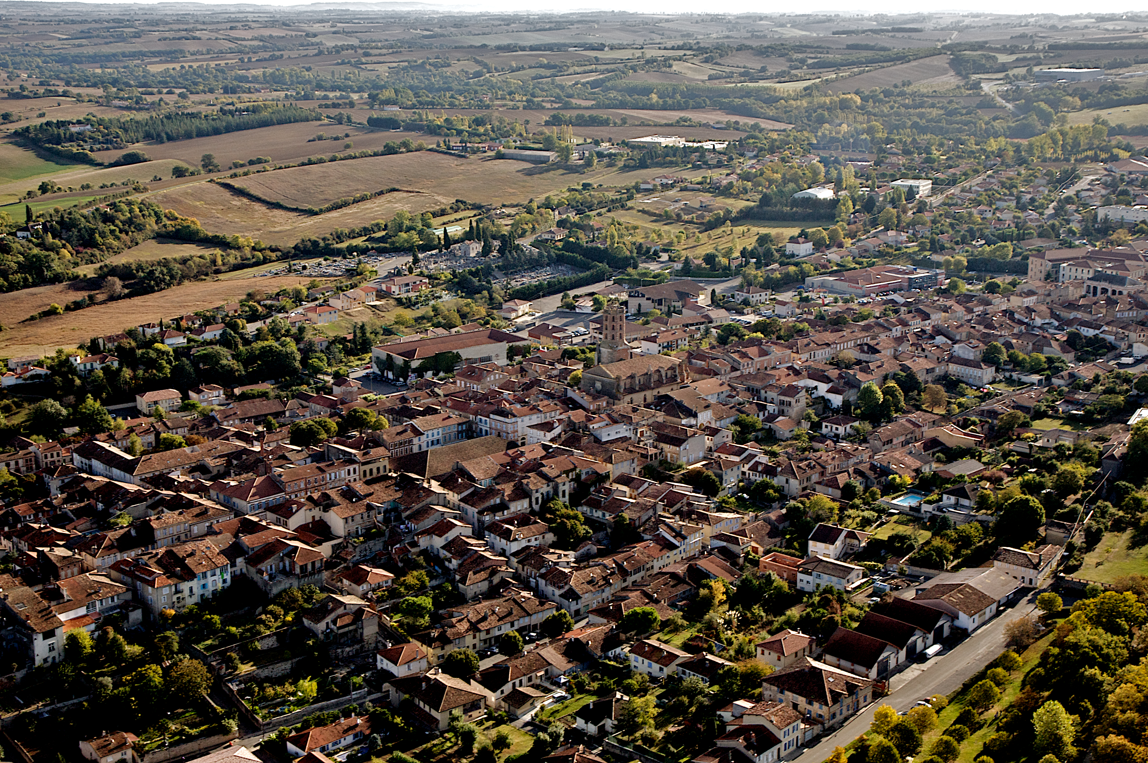 Vue aérienne de Gimont, au coeur du Pays Portes de Gascogne. Crédit photographique : Isabelle Souriment